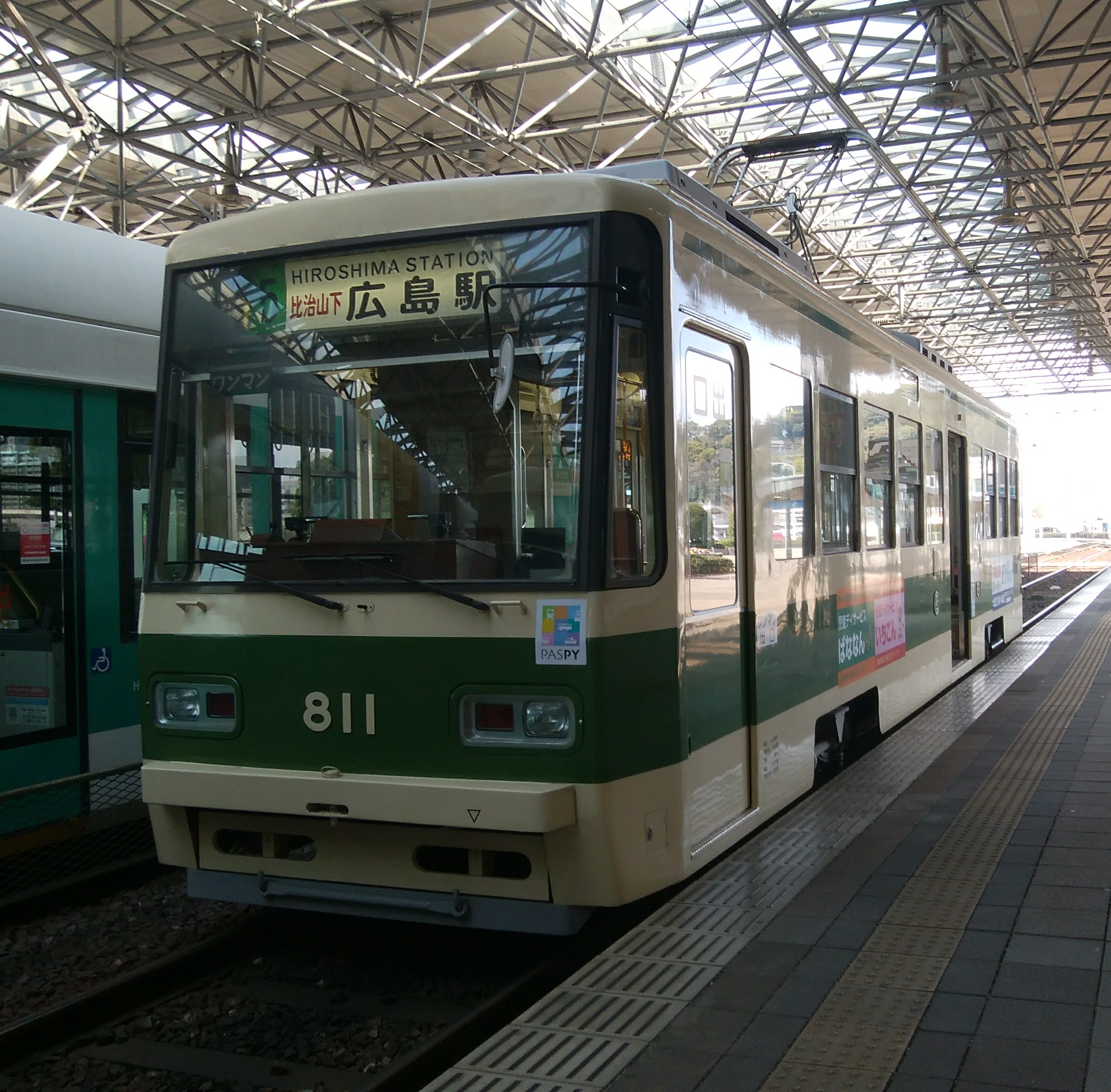 広島港停車中の811号